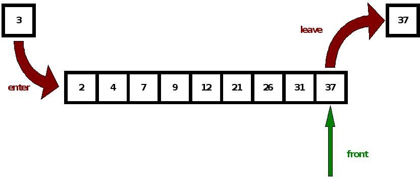 Warteschlange (Queue) - Datenstruktur